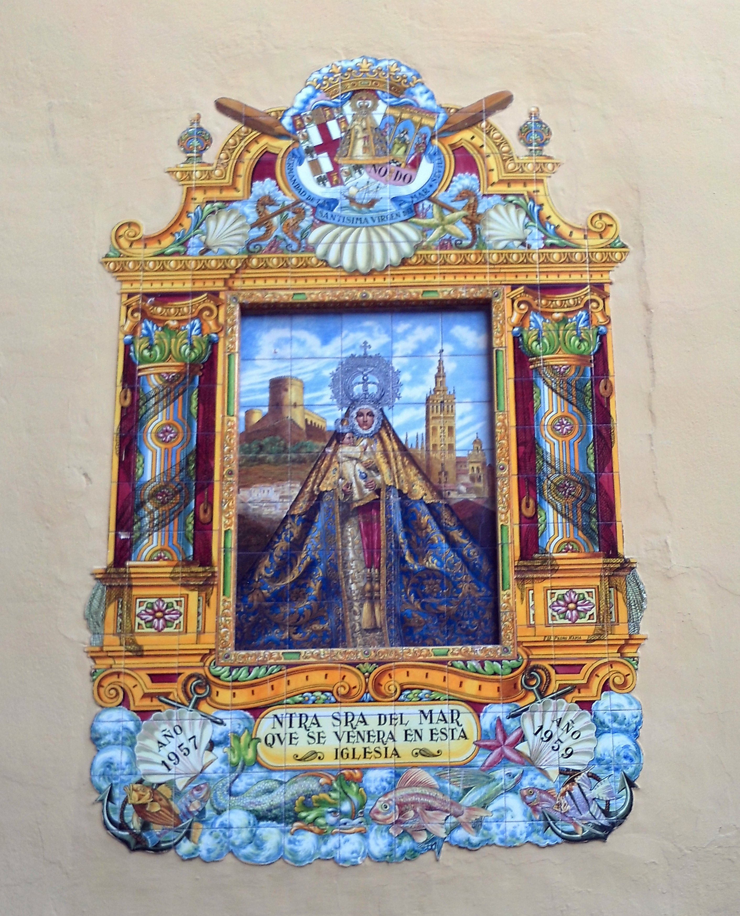 Azulejo de la Virgen del Mar en la iglesia del antiguo hospital de la Misericordia. Sevilla, Andalucía, España.